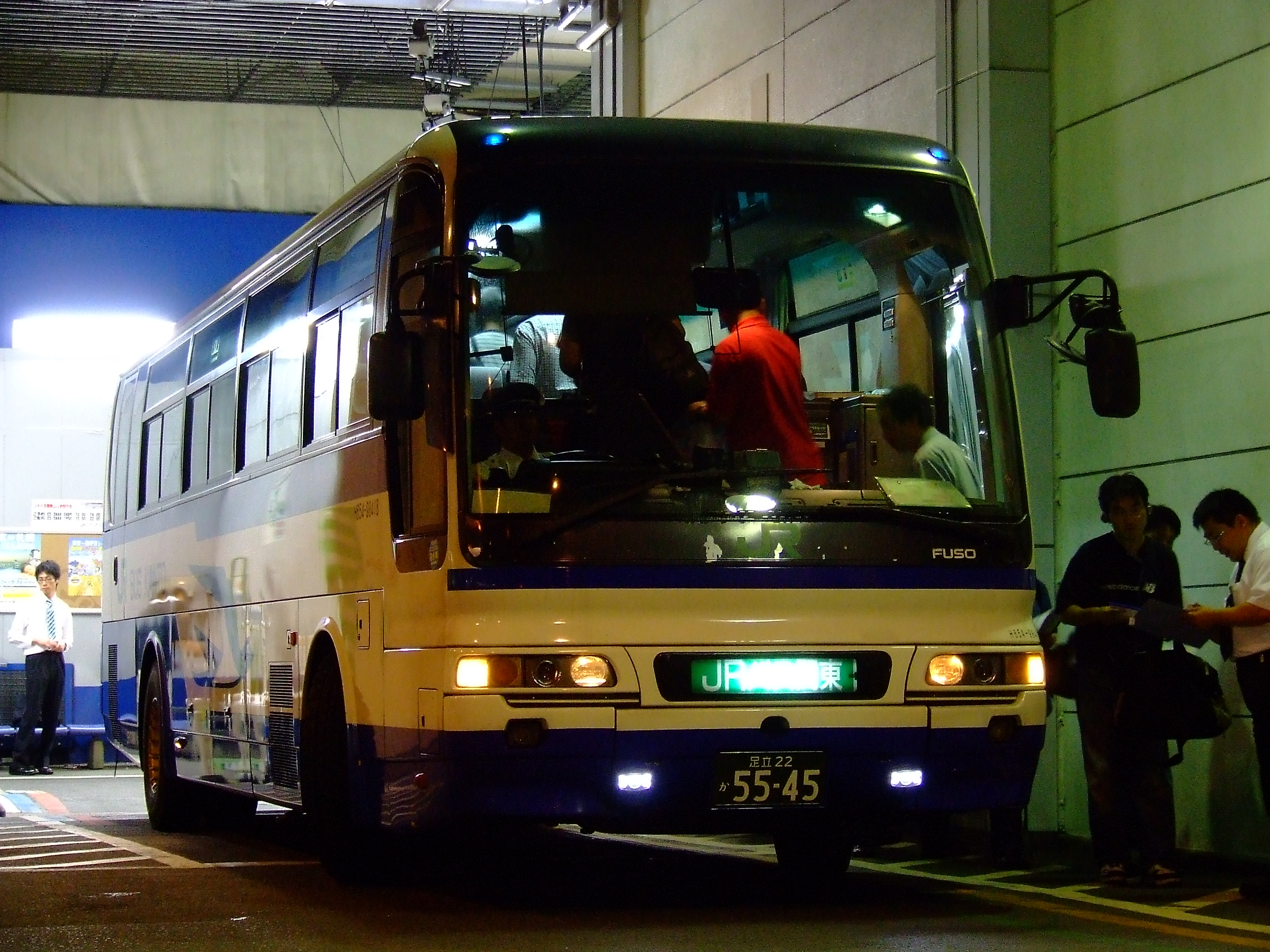 JRバス関東主催のバスツアーにおいてリバイバル運行された「ドリーム志賀号」 新宿駅新南口バスターミナルにて